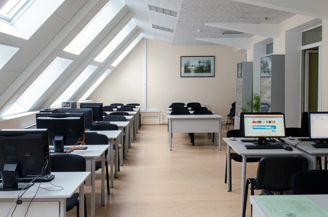 Читальный зал №6 Библиотеки Башкирского государственного университета